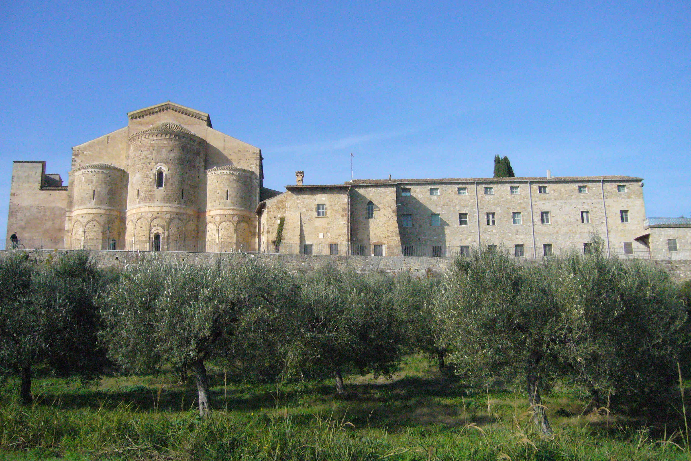 Abbazia di San Giovanni in Venere